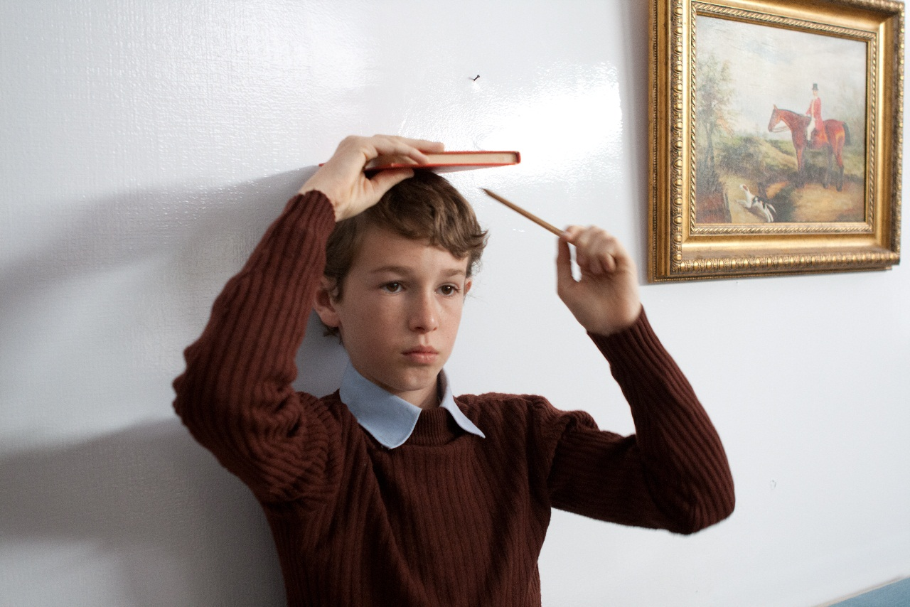 הדקדוק הפנימי צילום קארין בר